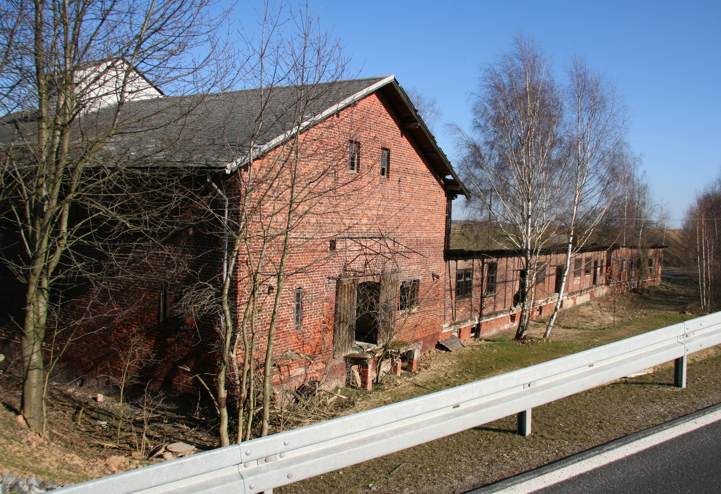 Gebäude am ehemaligen Bahnhof Beiern